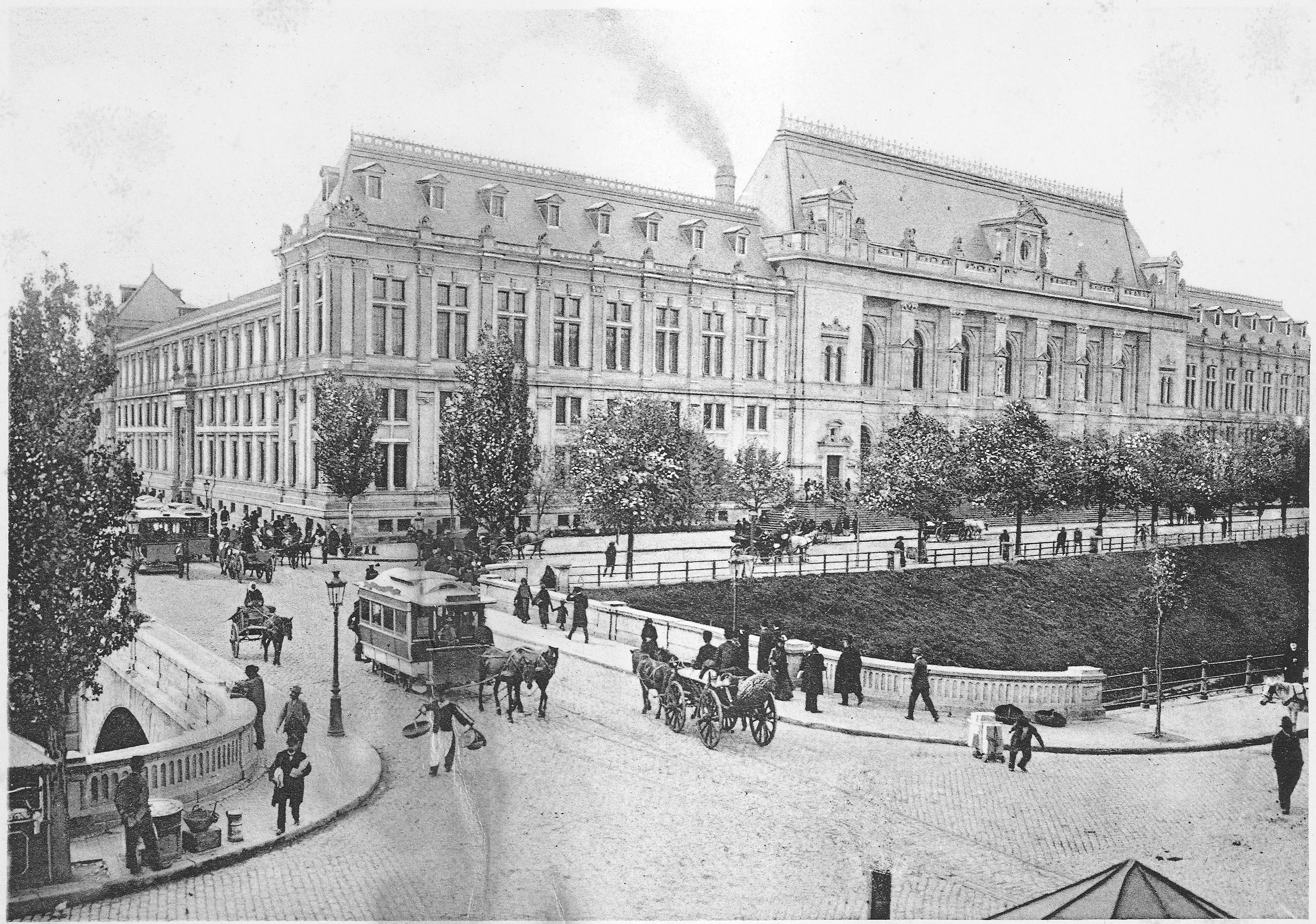 Palatul de justiţie, Bucharest